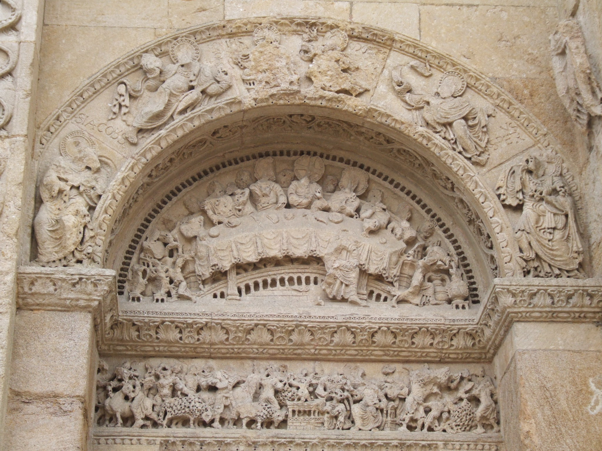 petit portail de Saint Fortuné de Charlieu